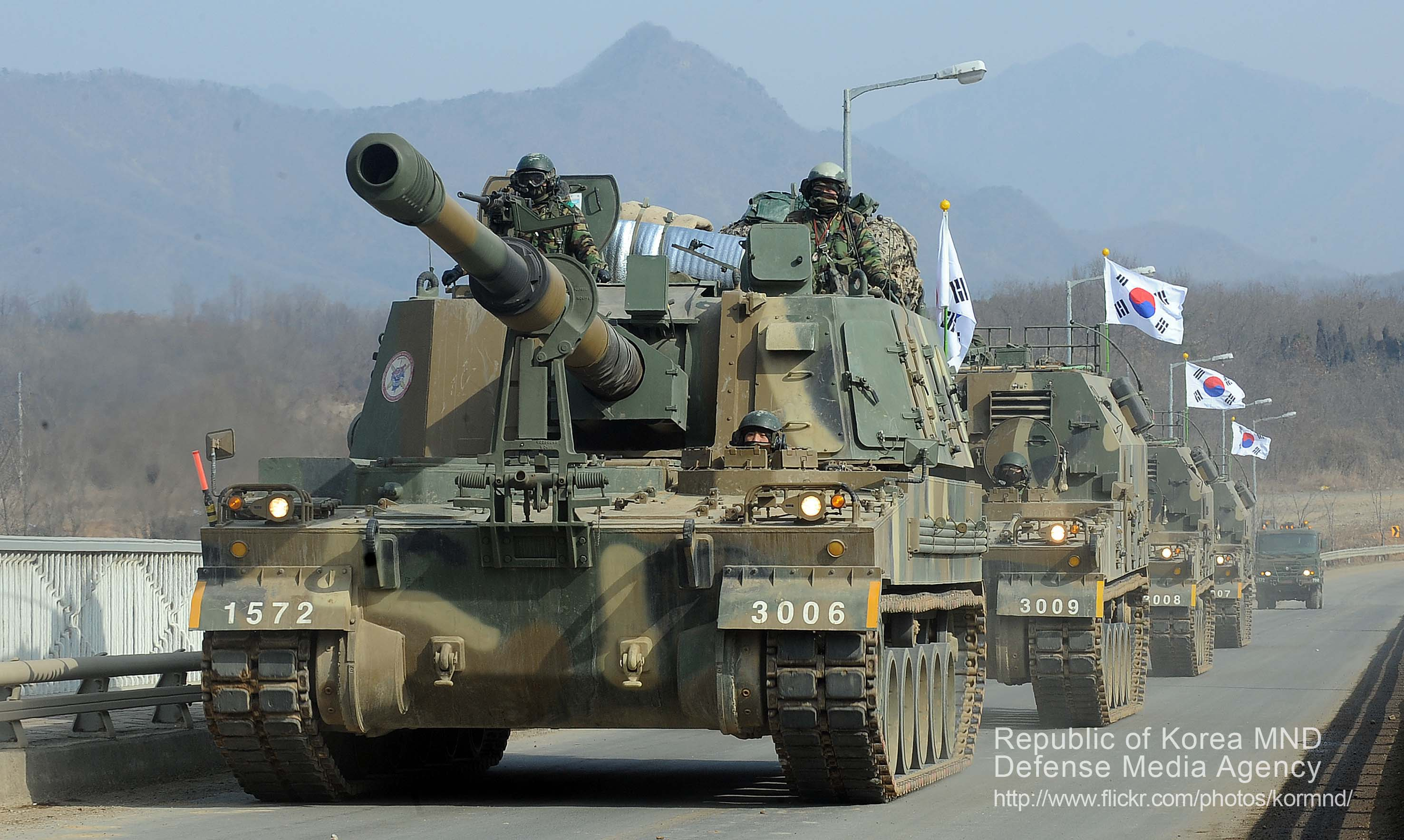 2010 국방화보 Rep. of Korea, Defense Photo Magazine 육군6포병여단은 화력 전투임무 수행능력 향상을 위한 K- 9, K-55,포탄사격훈련 및 기동을 실시했다